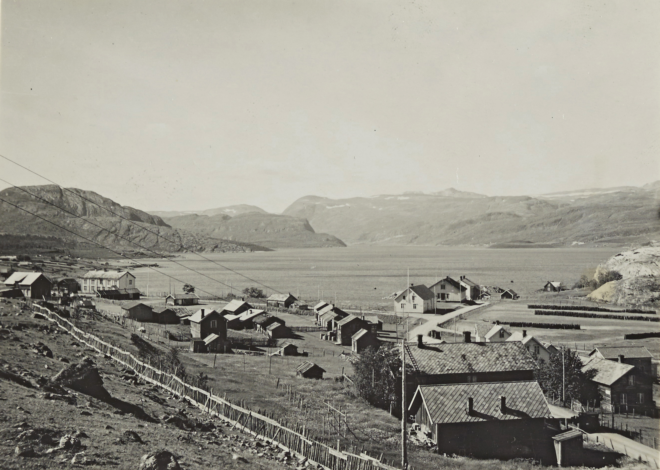 Markedsplassen, Bossekop i 1931.